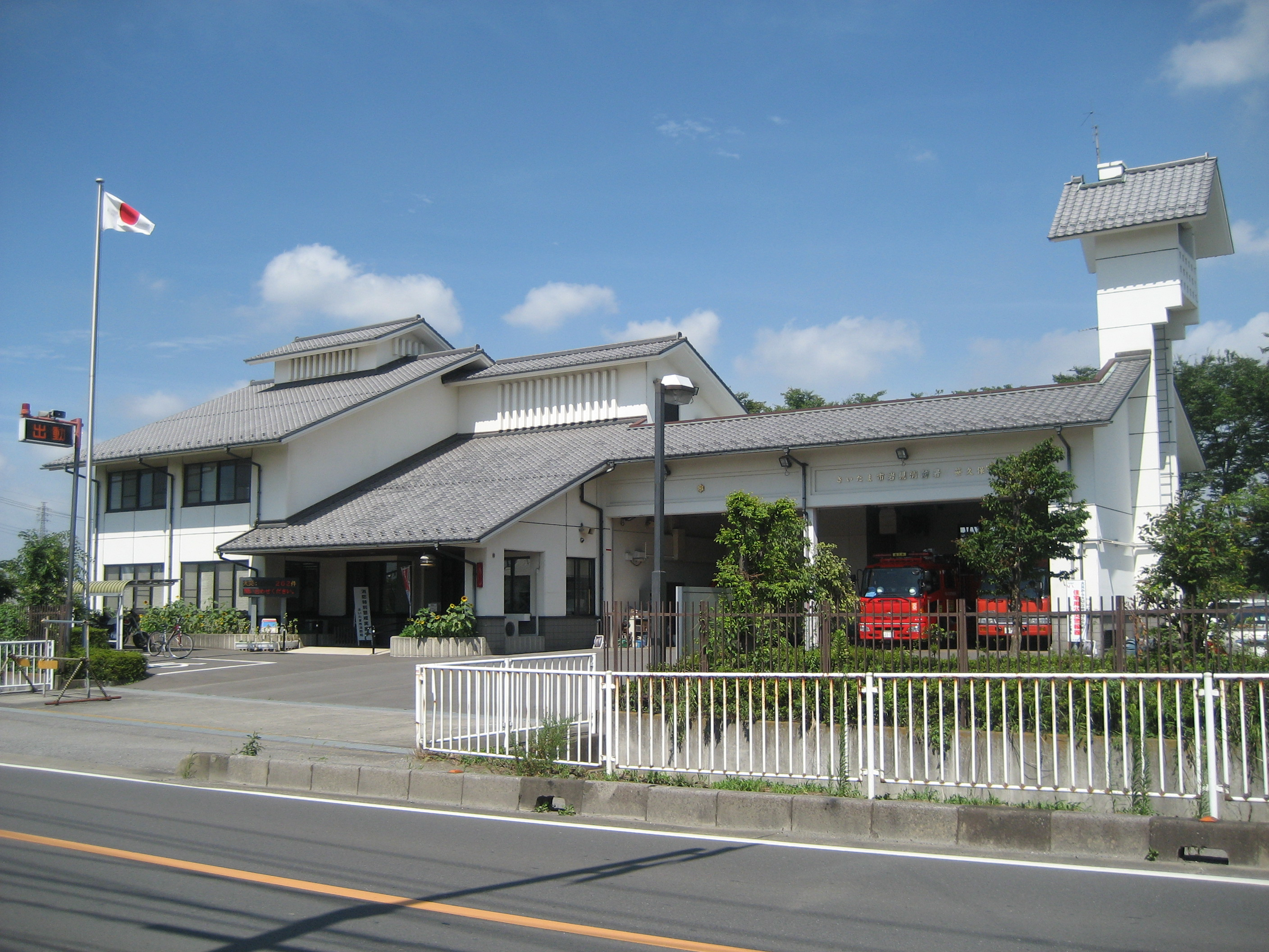 さいたま市消防局岩槻消防署笹久保出張所